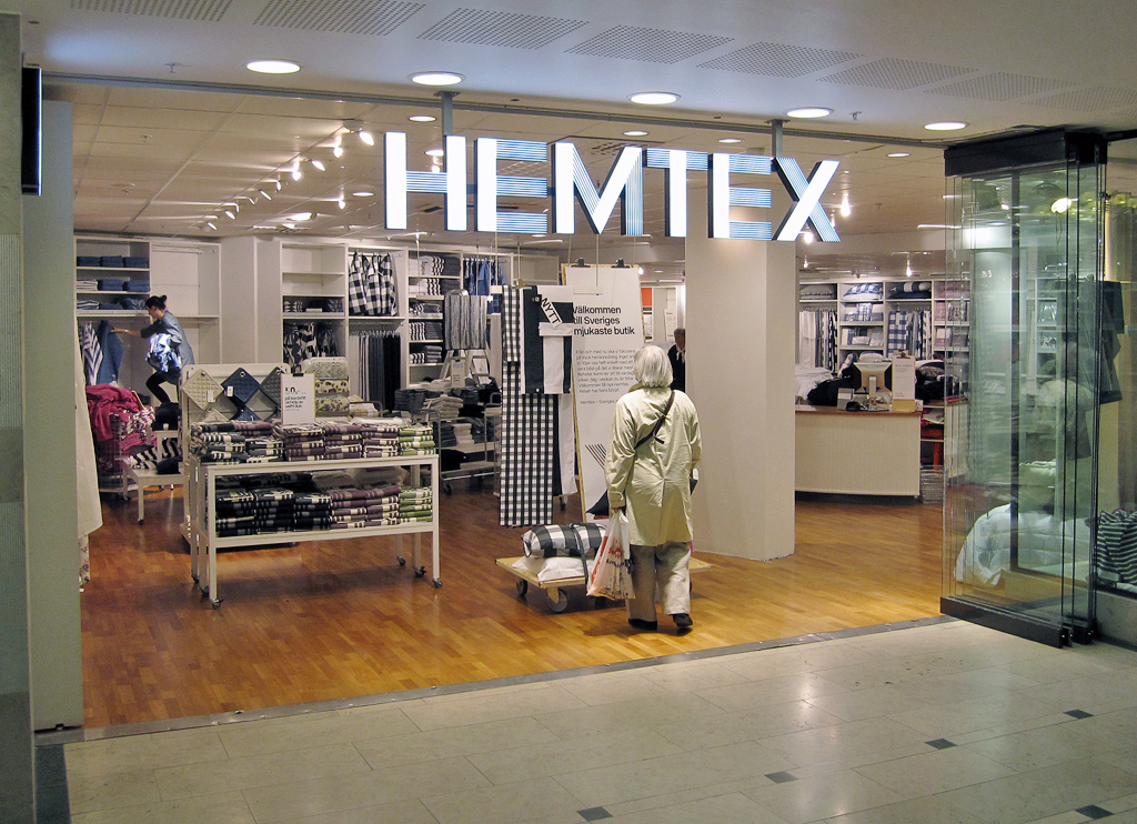 En Hemtexbutik i Västermalmsgallerian.